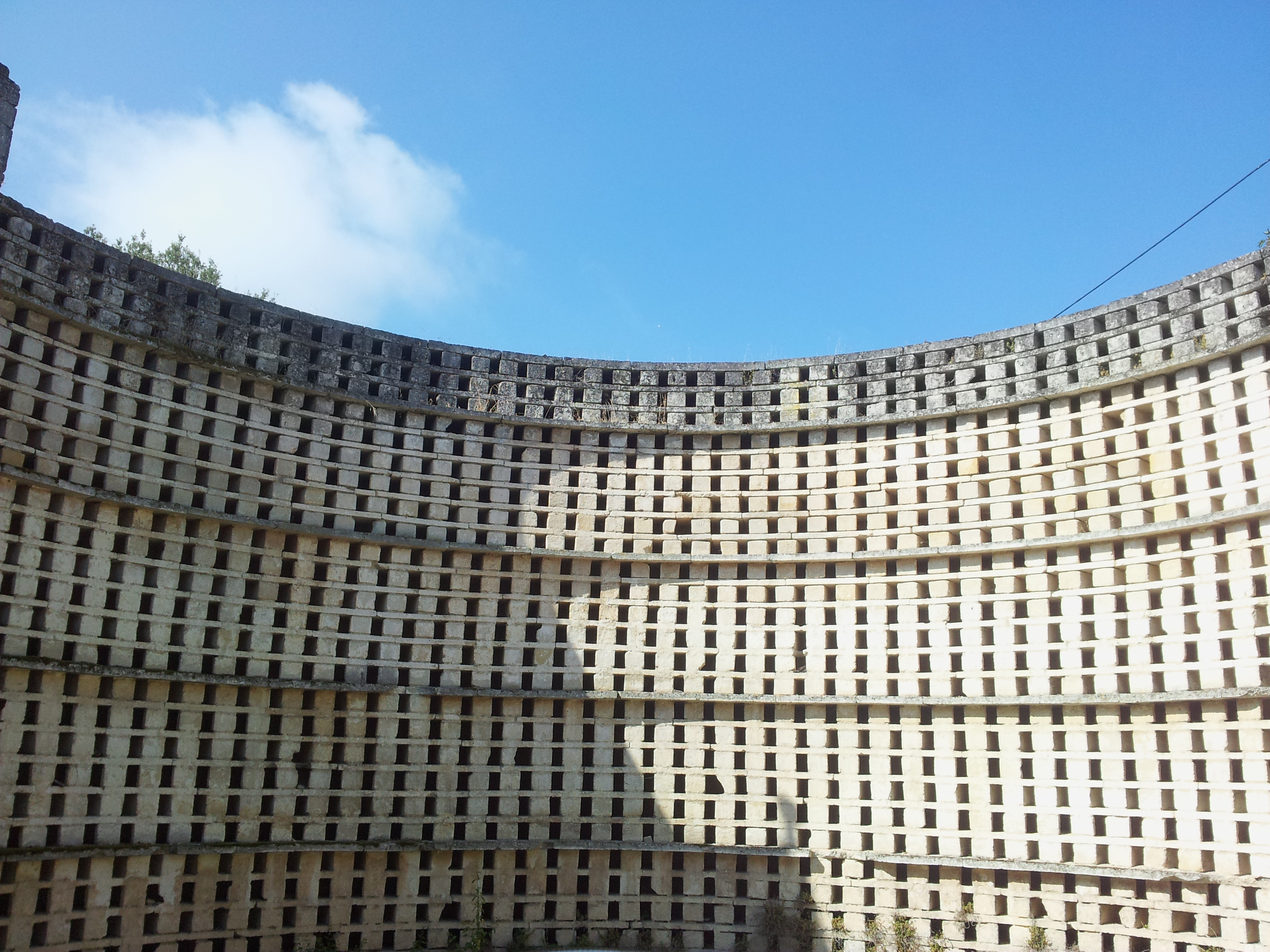 Vue partielle intérieur